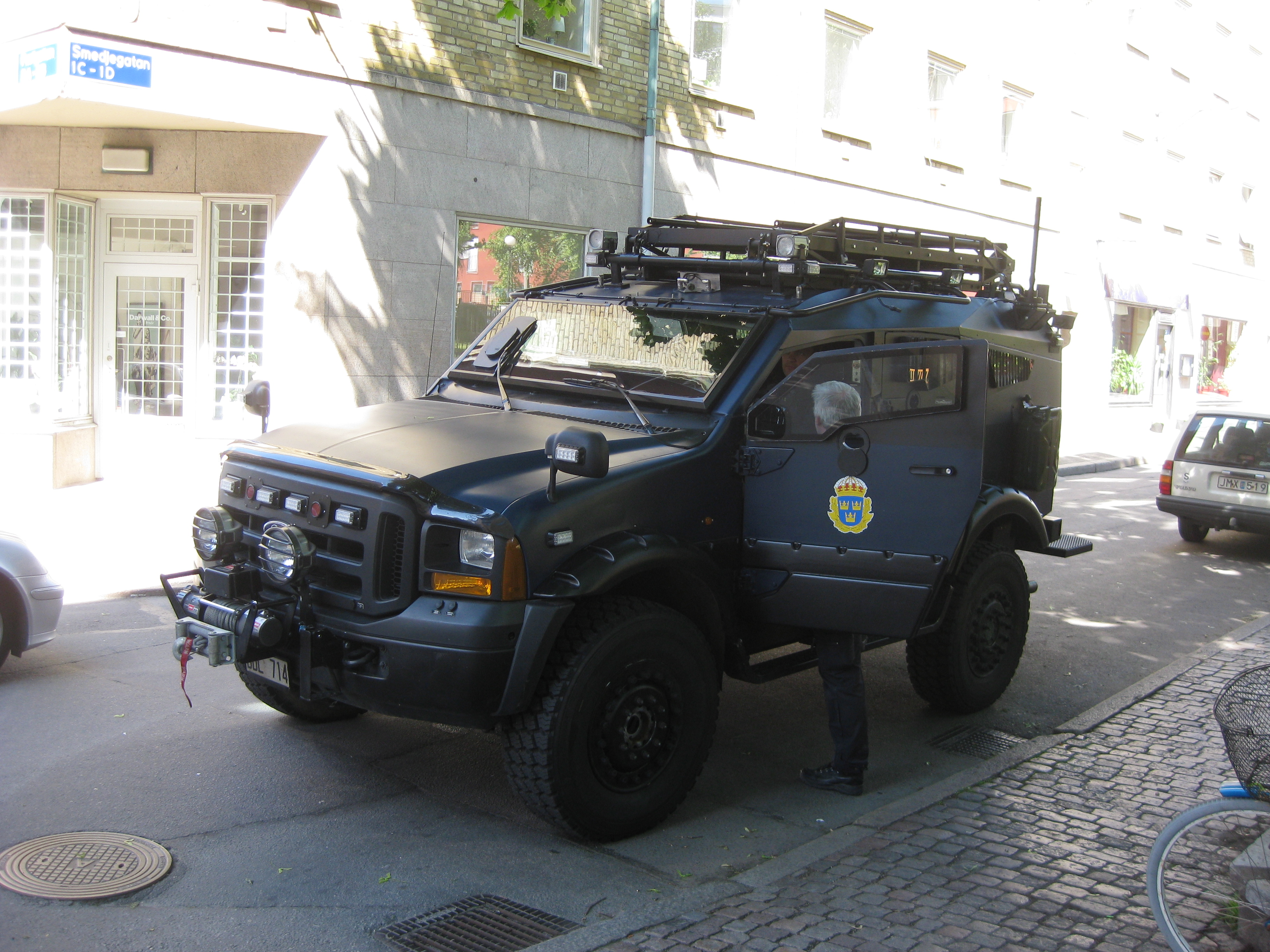 The armoured vehichle "Sandcat". This one belongs to the police of Gothenburg, Sweden.